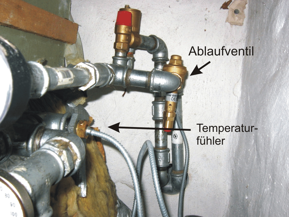 Thermische Ablaufsicherung an einem holzbefeuerten Kessel